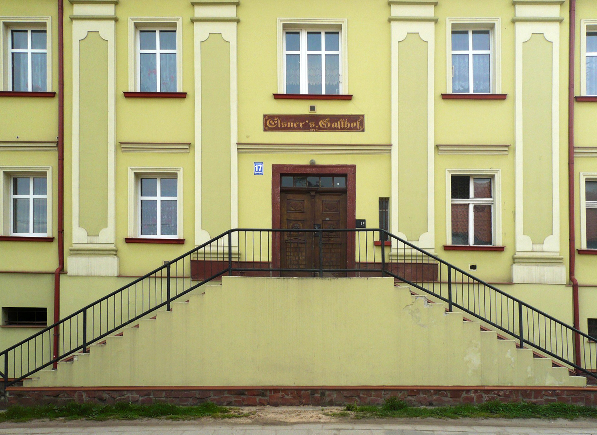 Nowa Ruda, ul. Niepodległości 17 - rządcówka, 1860